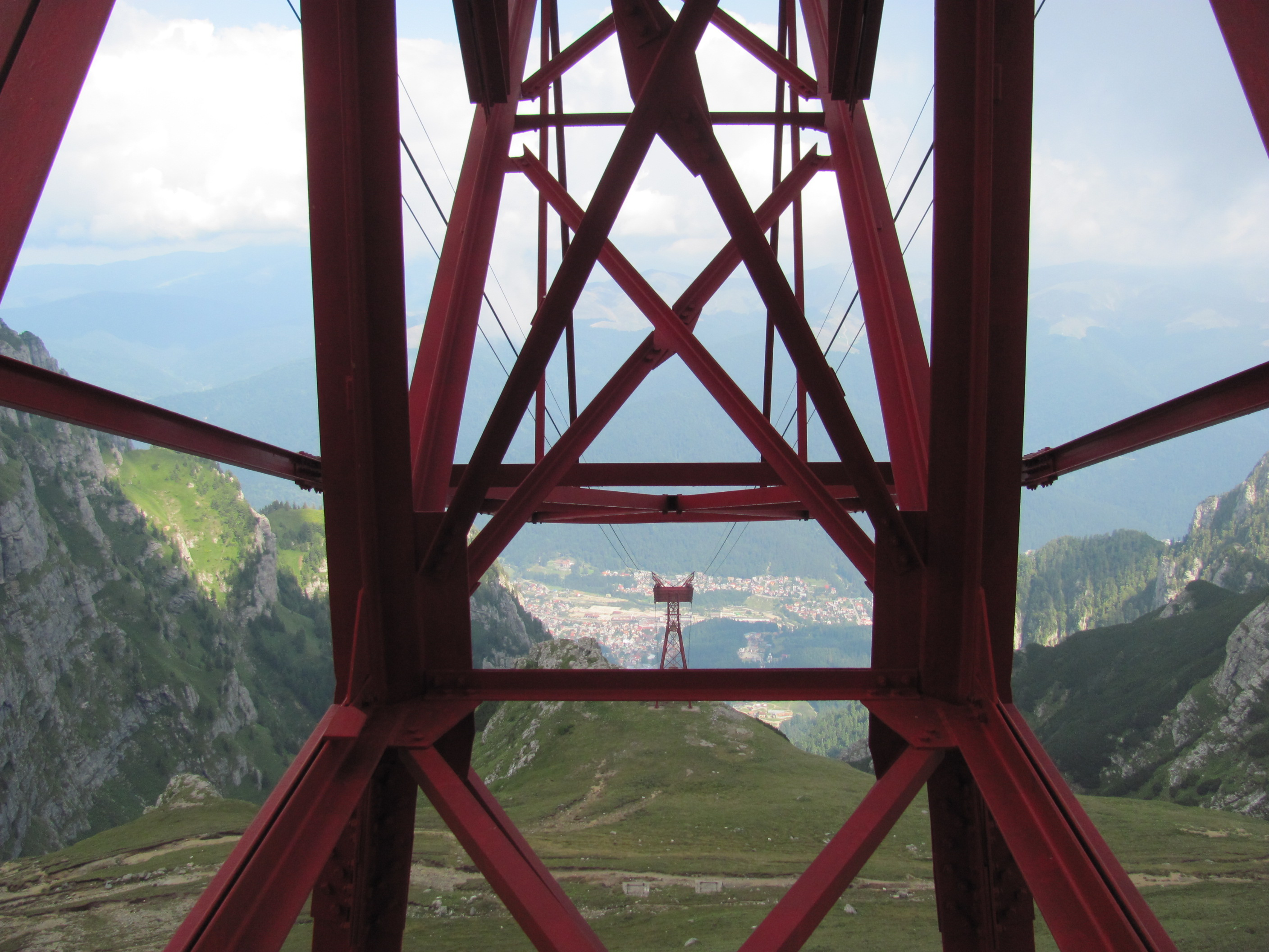 Vedere spre Busteni si stalpul periculos de pe Stalpul 5 al telecabinei Busteni-Babele